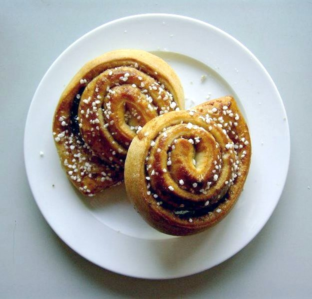 Zwei Kanelbullar - schwedische Zimtschnecken auf einem Teller